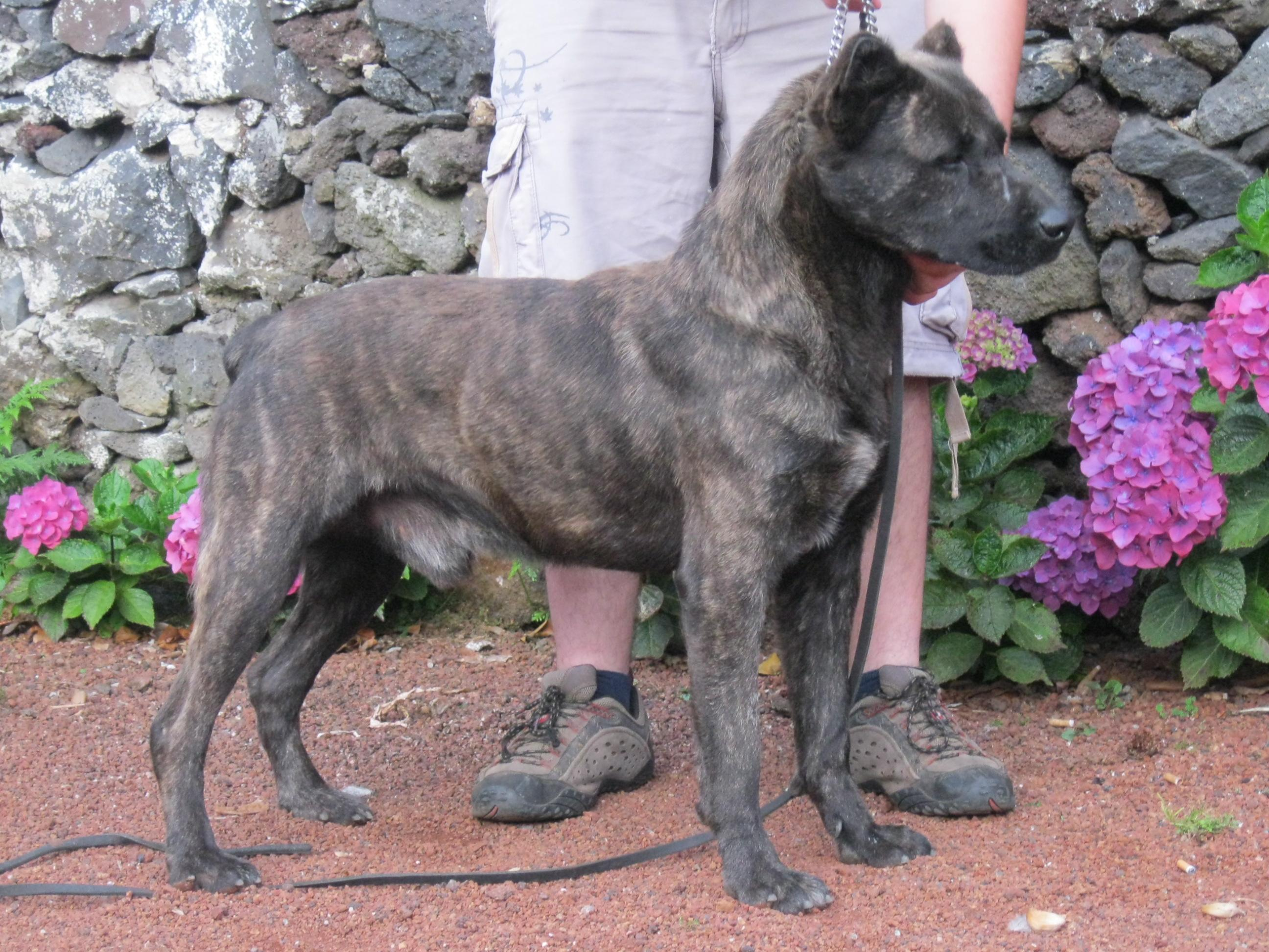 Cão De Fila S. Miguel Unknown